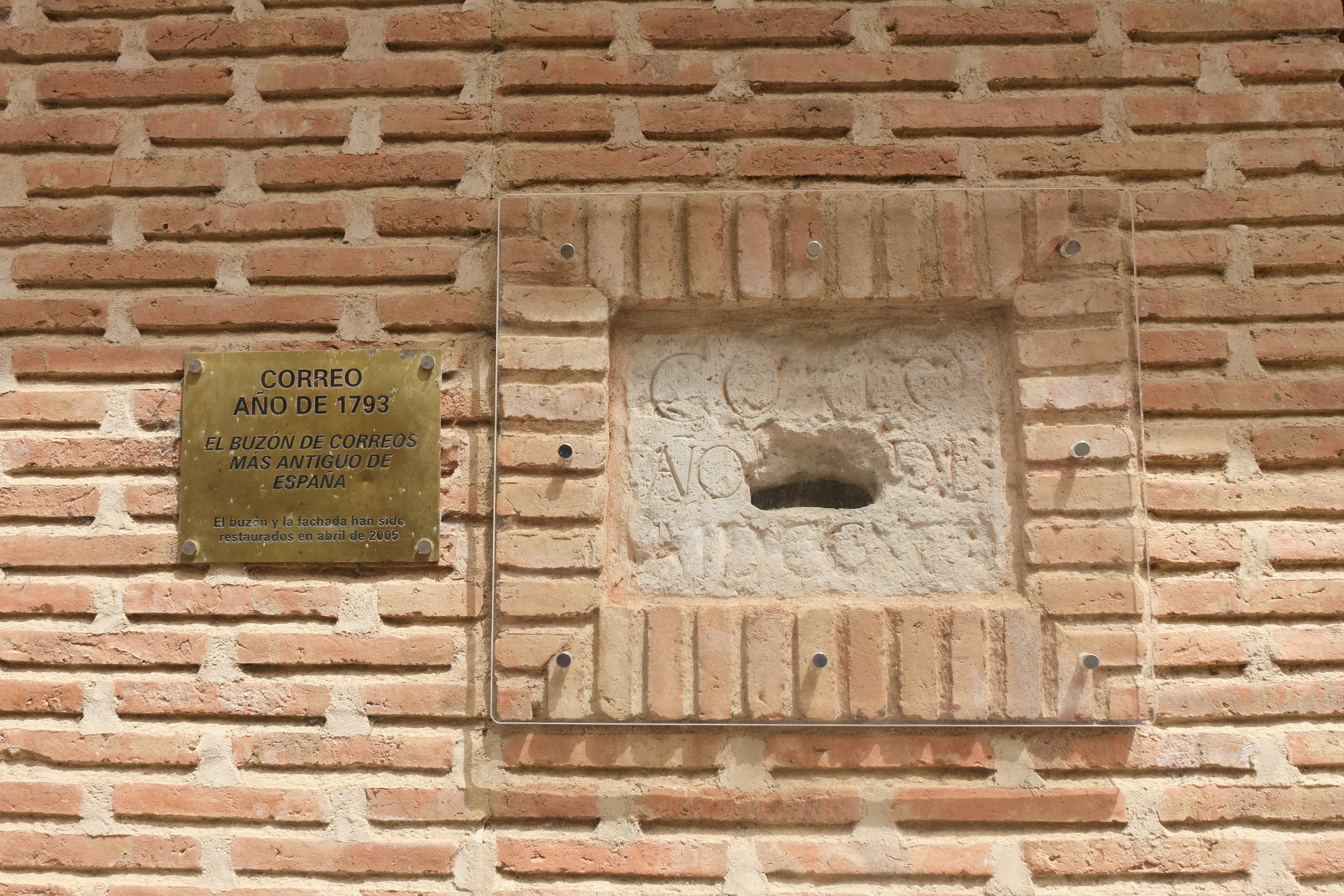 Buzón de correos más antiguo de España, en Mayorga (Valladolid, España).